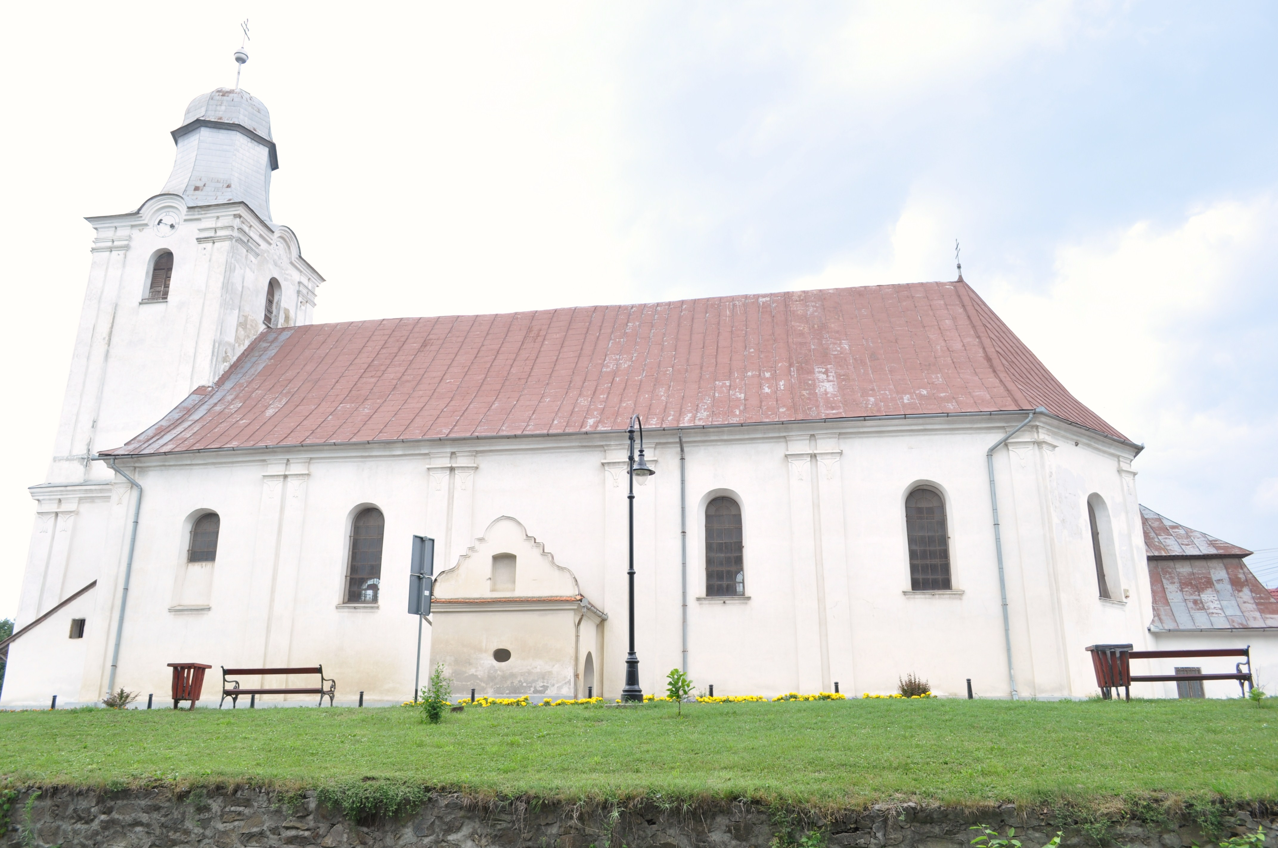 Brețcu, județul Covasna